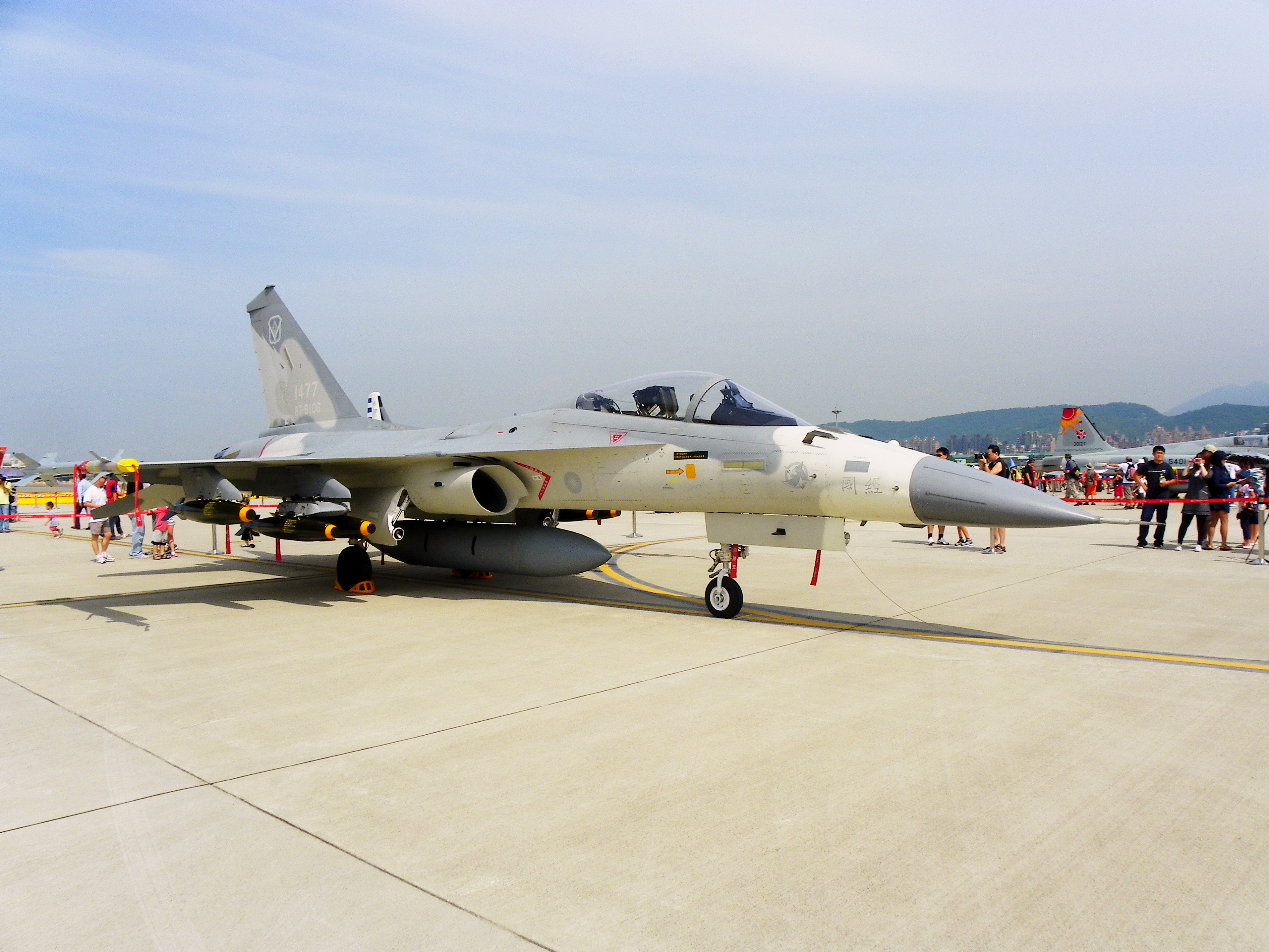 2011年8月13日，空軍松山基地營區開放活動中靜態展示的F-CK-1A 1477。